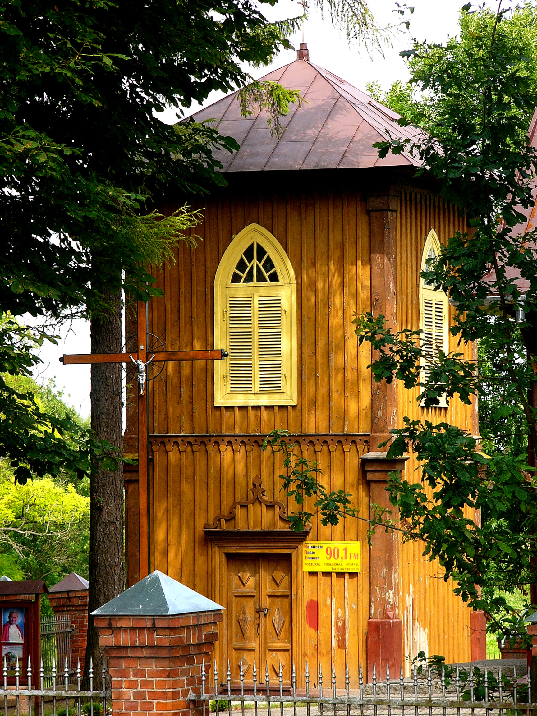 Moniatycze, dzwonnica, 1870